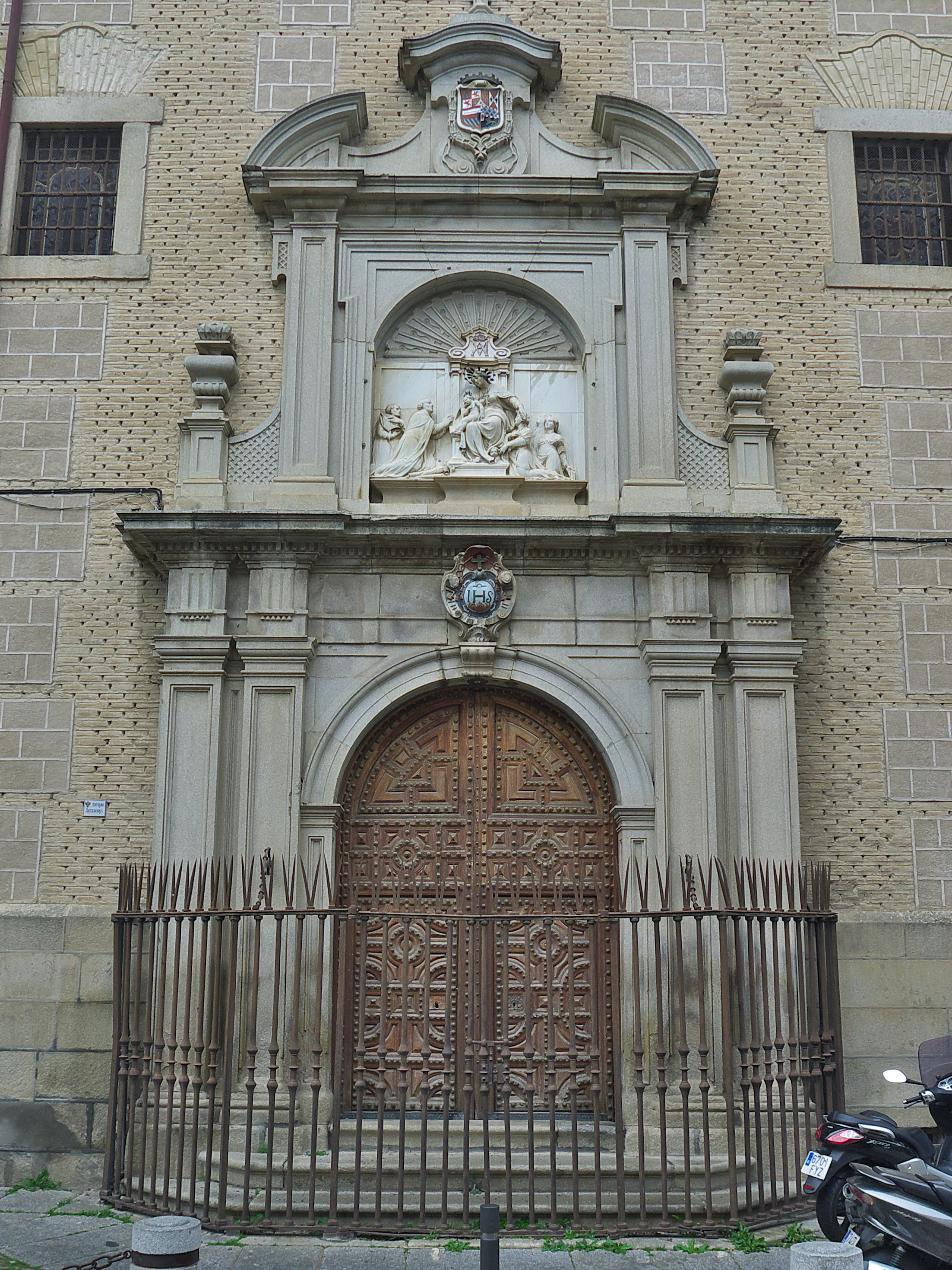 El cardenal, arzobispo de Toledo, Juan Martínez Silíceo, funda un colegio para cien muchachas (1551). En tiempos del Cardenal Lorenzana se sustituyó la portada por la actual, realizada por José de Beraya y Juan Ignacio Saizar (1763)